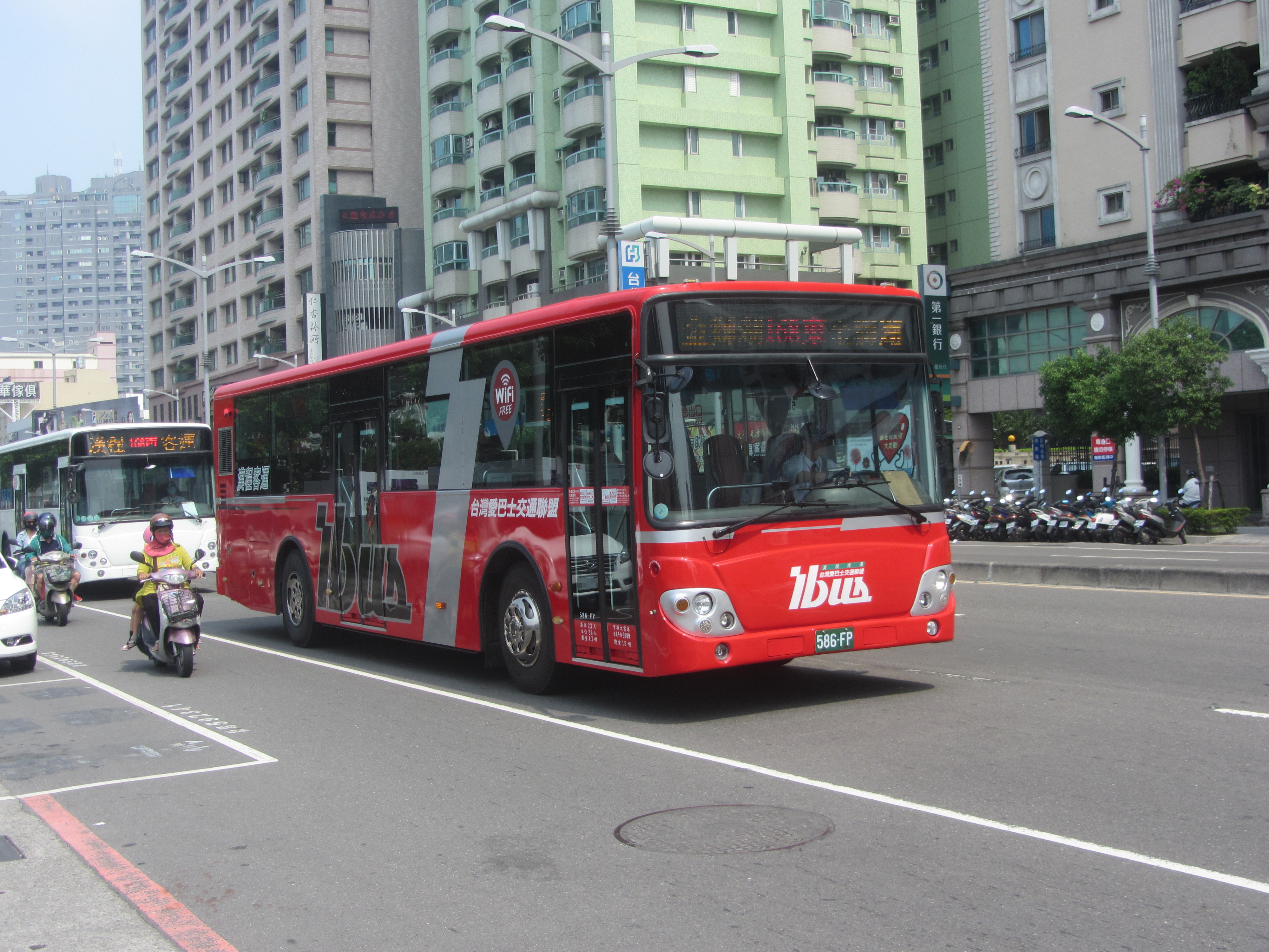 漢程客運大客車586-FP行駛高雄市公車環狀幹線。